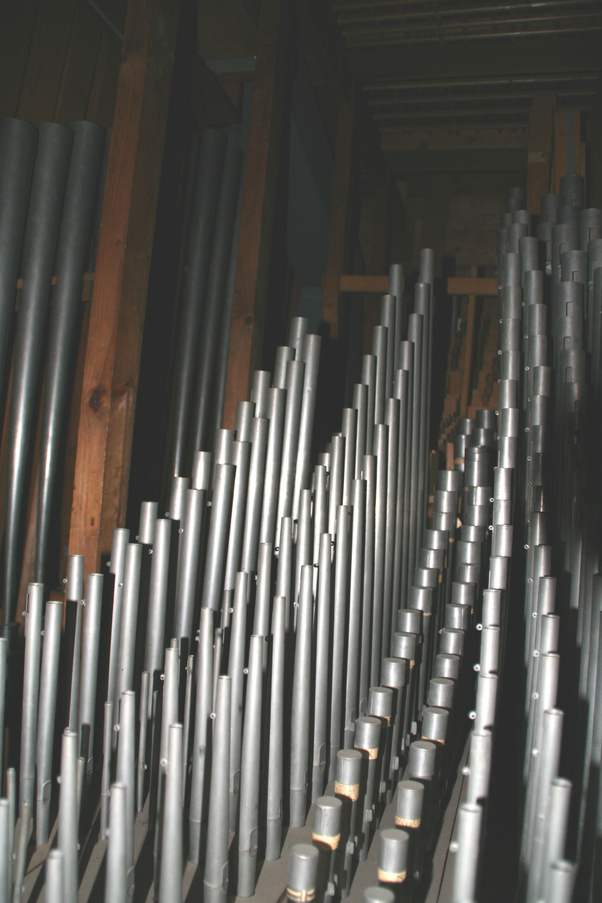 Uergelpäifen_an_der_Biissener_Kierch.